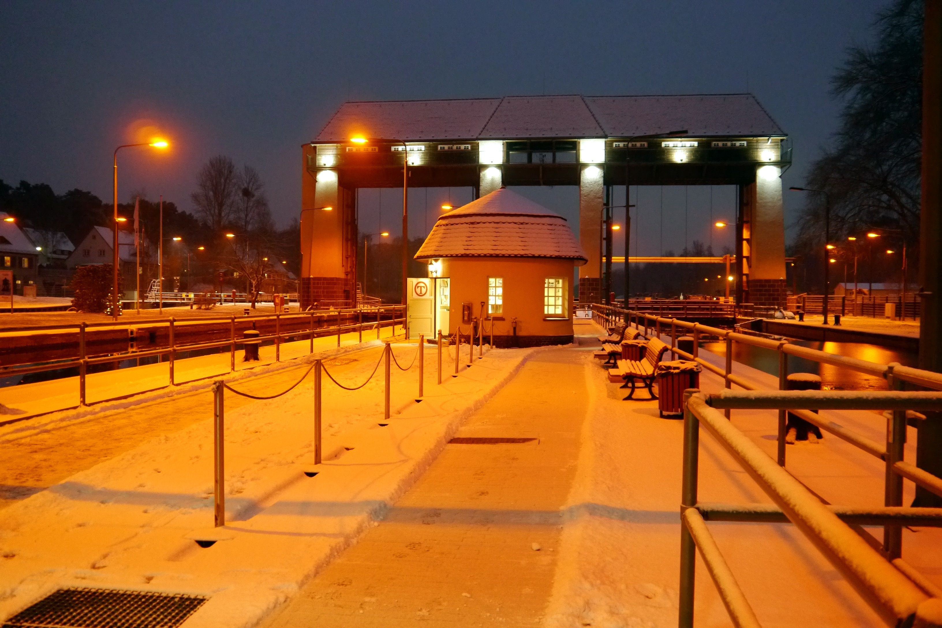 Schleuse Kleinmachnow, in der Schleusnerbude können sich interessierte Besucher Schautafeln und Videos zu Geschichte und Funktionsprinzip der Schleuse ansehen und von Fachkundigen erläutern lassen.